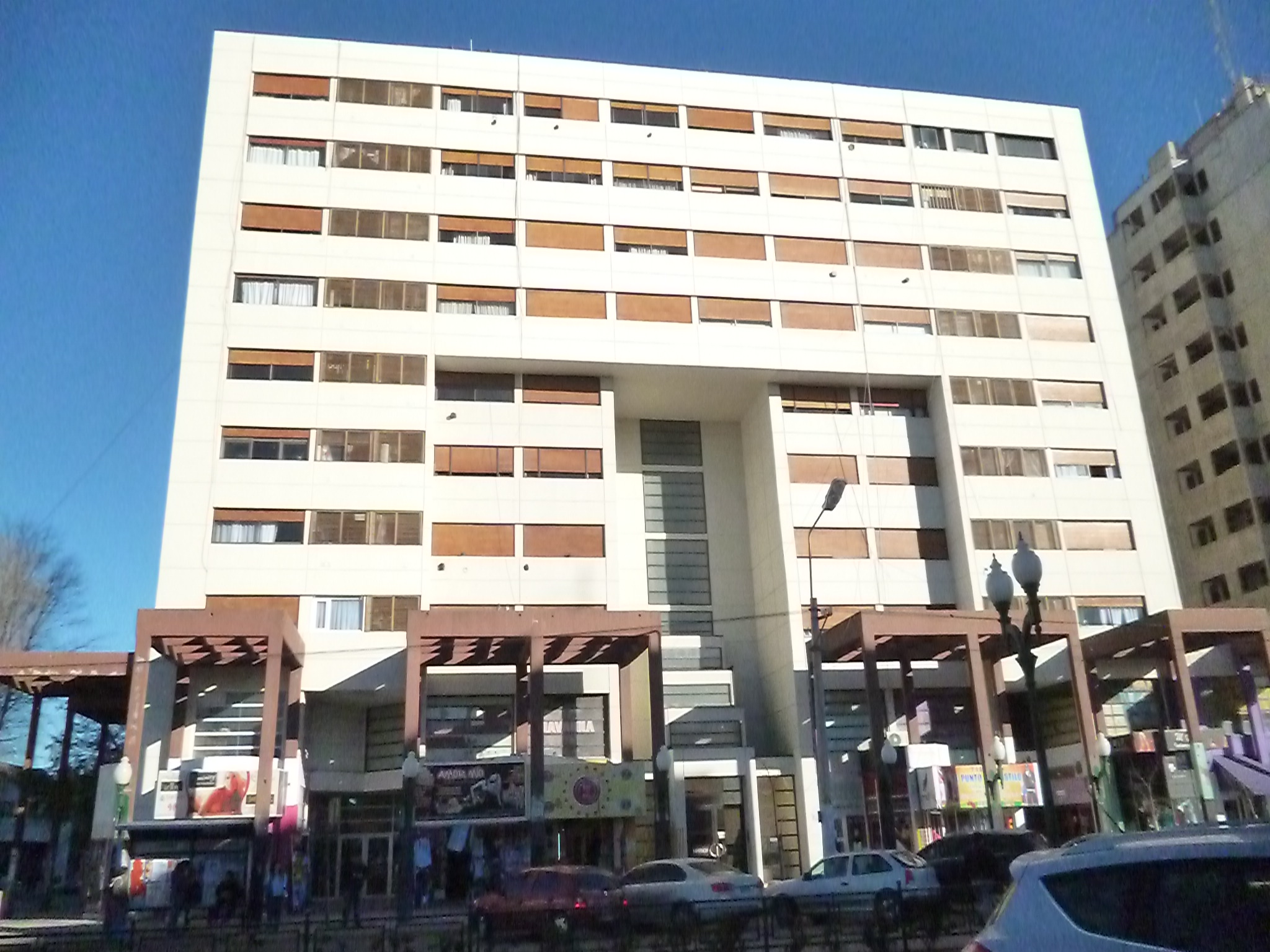 Edificio Fenix